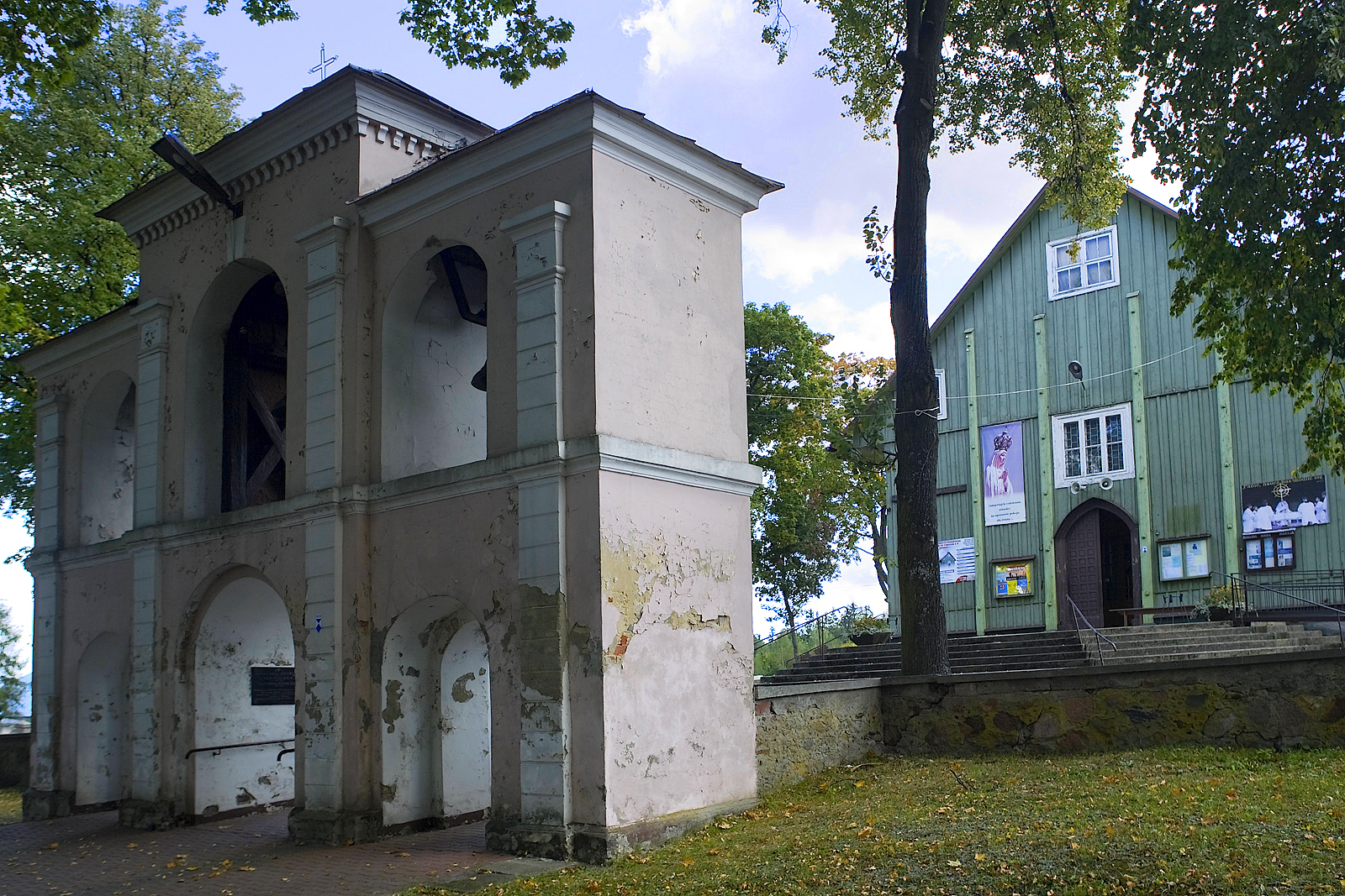 kościół par. p.w. św. Stanisława, drewn., 1816, dzwonnica i cmentarz kościelny w Sarnakach